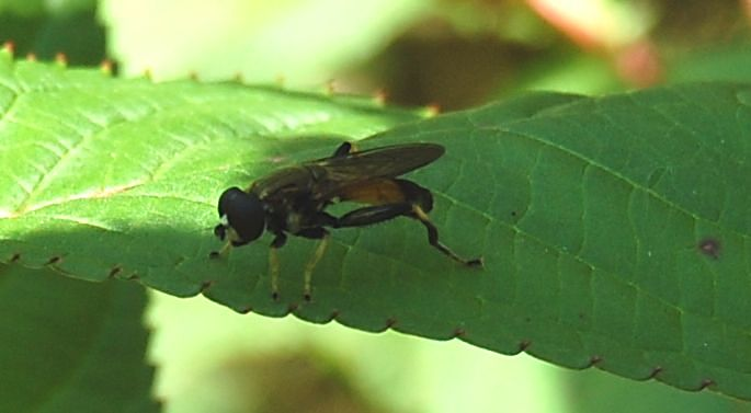 Xylota segnis (Syrphidae)